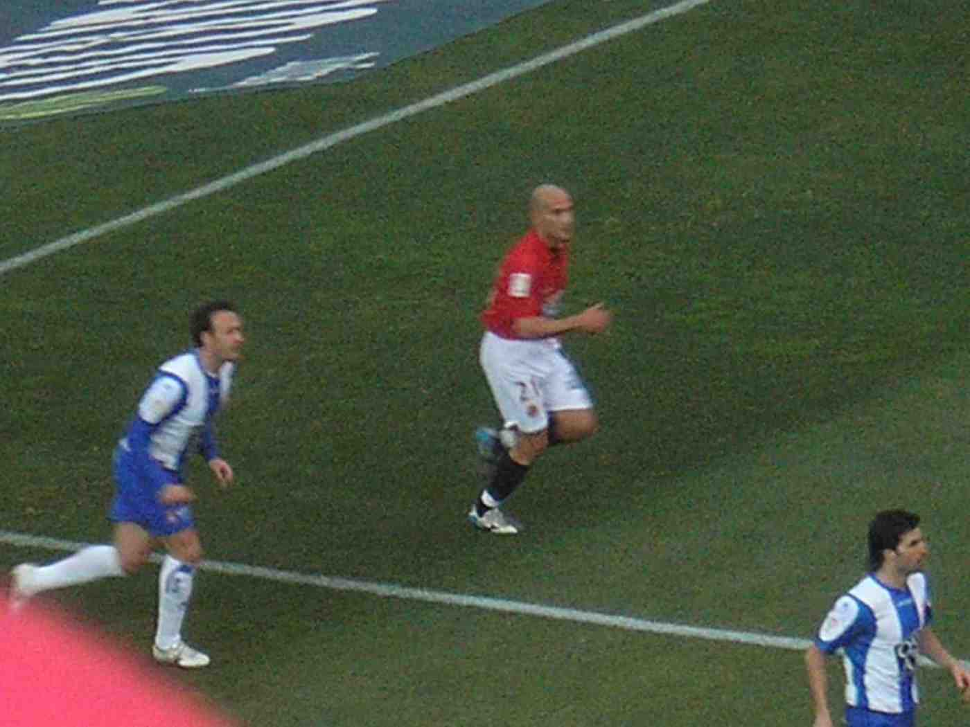 El jugador del Gimnàstic de Tarragona Antoni Pinilla, entre dos jugadors de l'Espanyol, el dia 28-1-2006 en el partit que acabà 4 a 0 favorable al Nàstic.